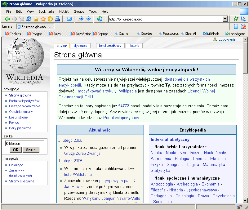 Przeglądarka internetowa K-Meleon - wersja 0.9